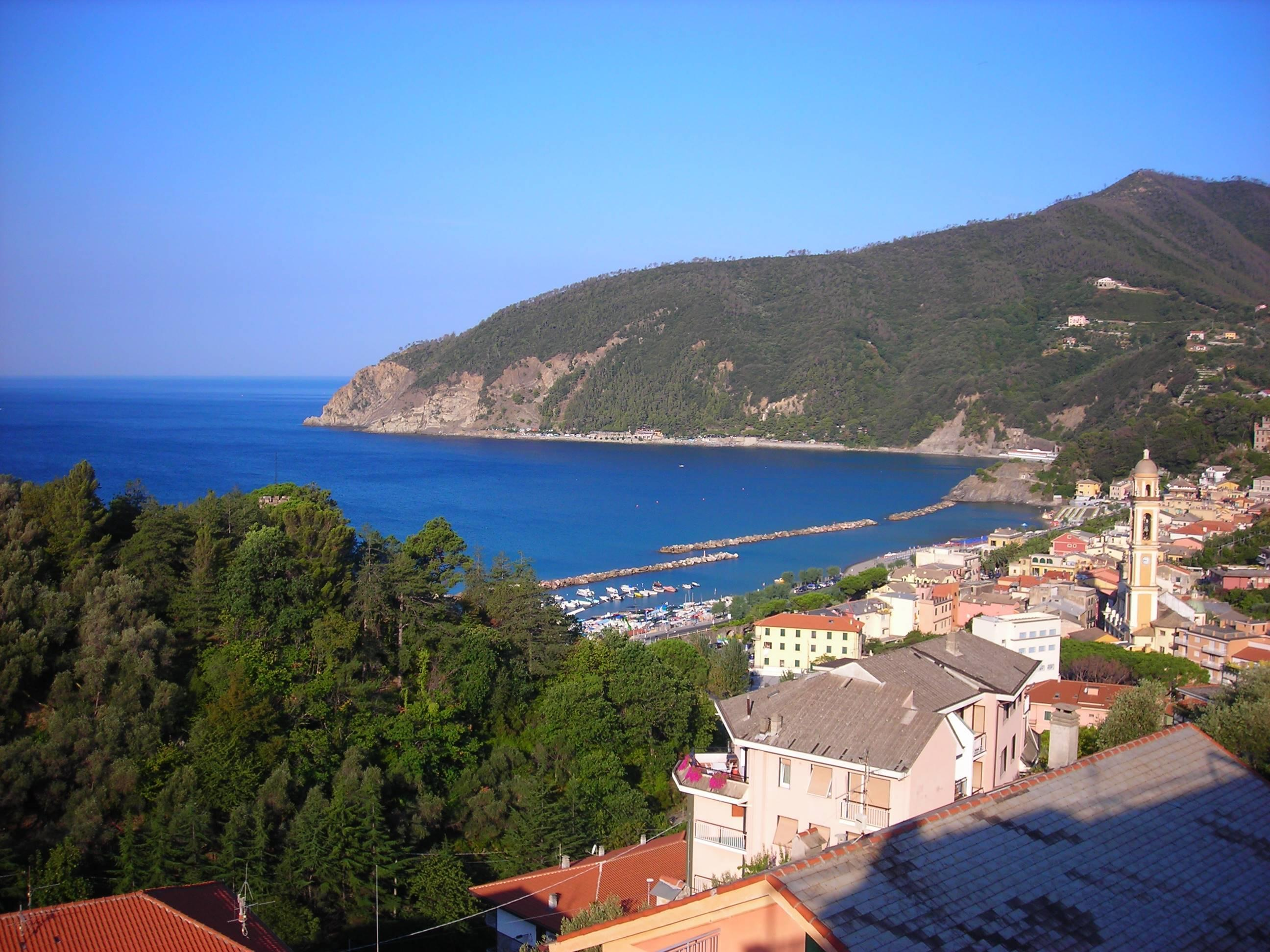 Foto scattata da Simone - Veduta paese Moneglia - Rilasciata sotto GFDL e Creative Commons